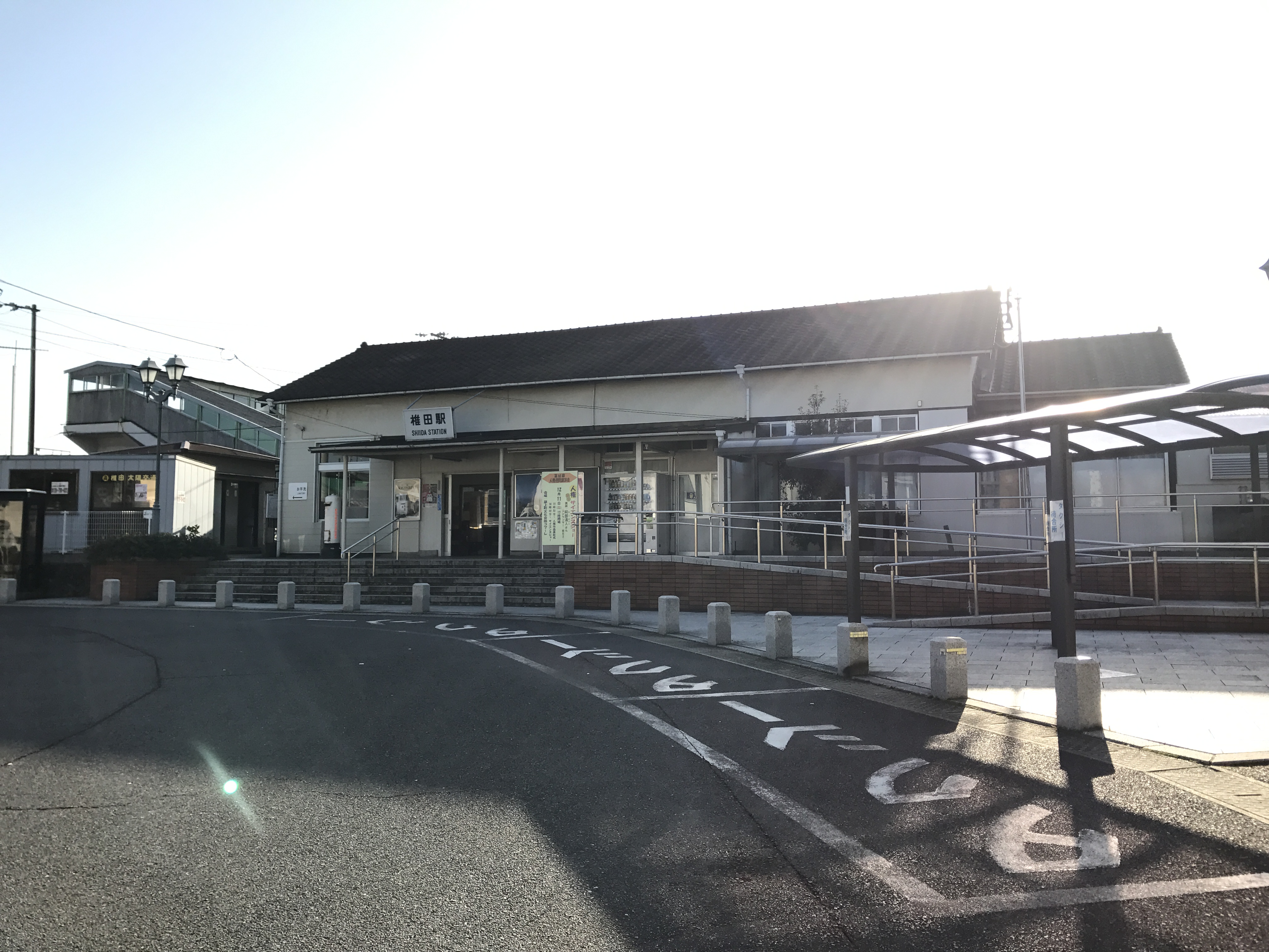 椎田駅駅舎